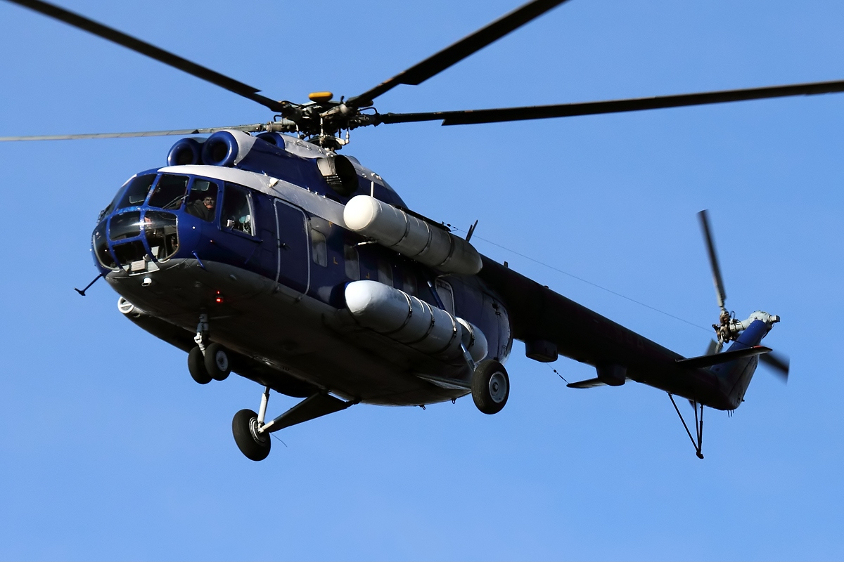 Gazpromavia Mil Mi-8PS